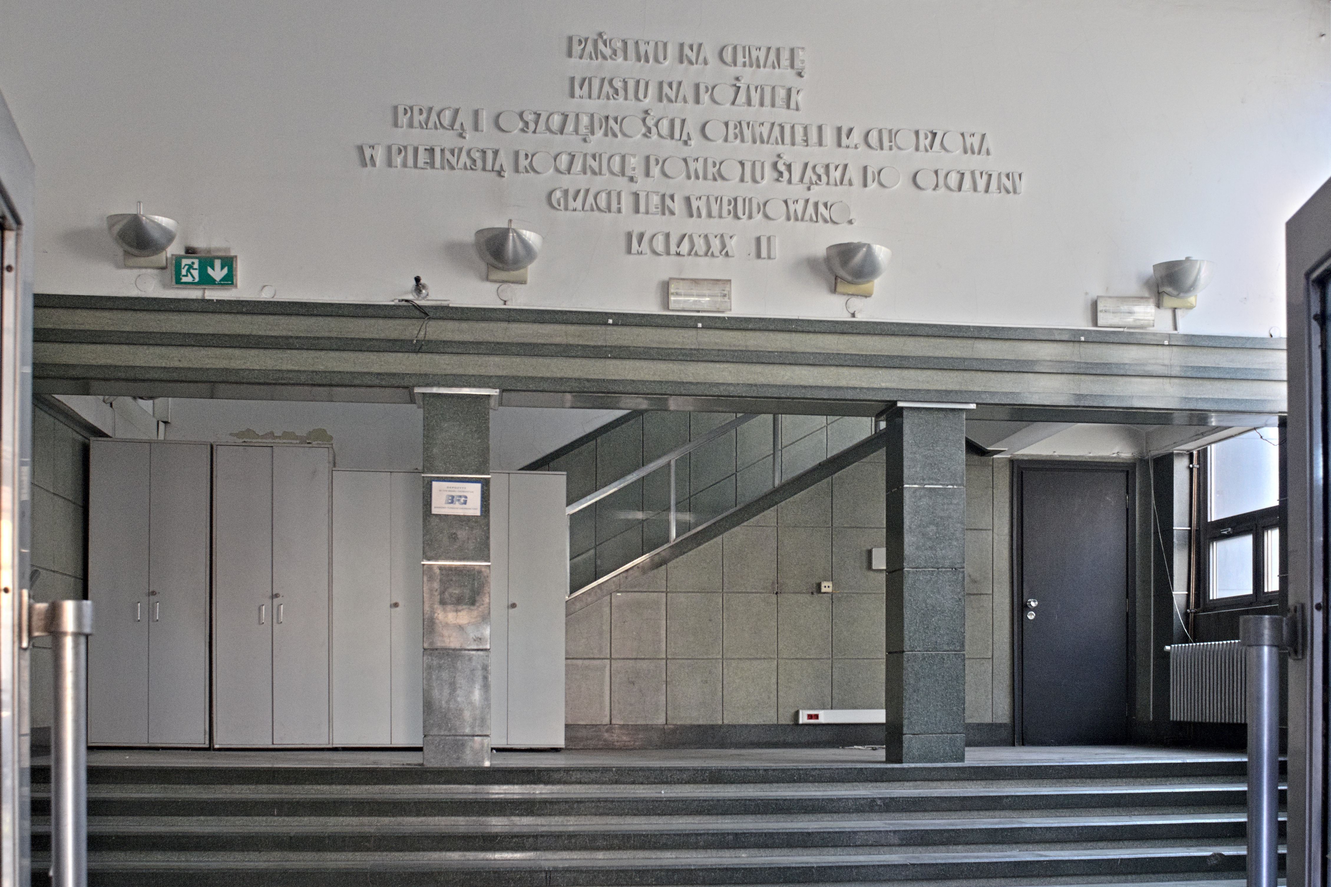 hol i klatka schodowa na parterze budynku Komunalnej Kasy Oszczędności w Chorzowie, z napisem: PAŃSTWU NA CHWAŁĘ / MIASTU NA POŻYTEK / PRACĄ I OSZCZĘDNOŚCIĄ OBYWATELI MIASTA CHORZOWA / W PIĘTNASTĄ ROCZNICĘ POWROTU ŚLĄSKA DO OJCZYZNY / GMACH TEN WYBUDOWANO. / MCMXXX[V]II (1937)